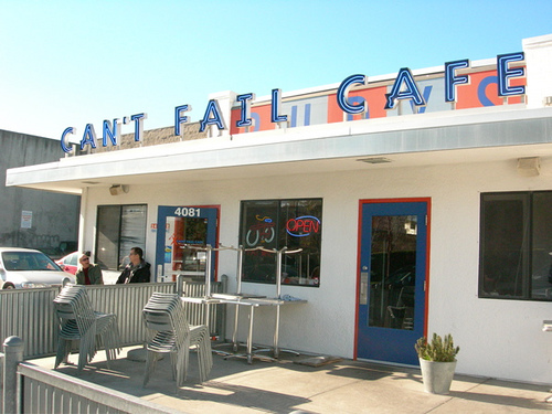 Imagen donde se ve el restaurante de “Can't Fail Cafe”, propiedad de Mike Dirnt (bajista del grupo de música Green Day)